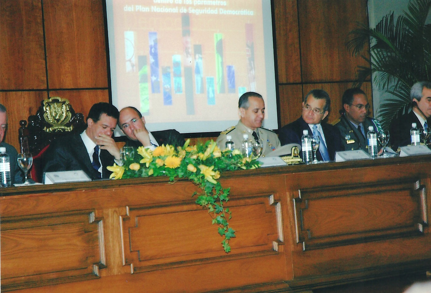 Francisco Domínguez Brito en la inauguración del Palacio de Justicia de Santo Domingo, 5 de enero de 2005.